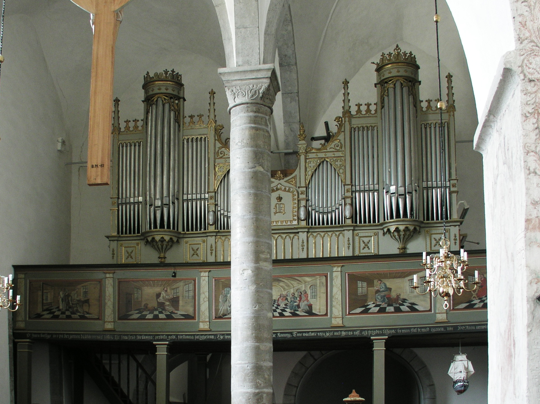 Othem kyrka / Othem church, Gotland, Sweden. Organ.